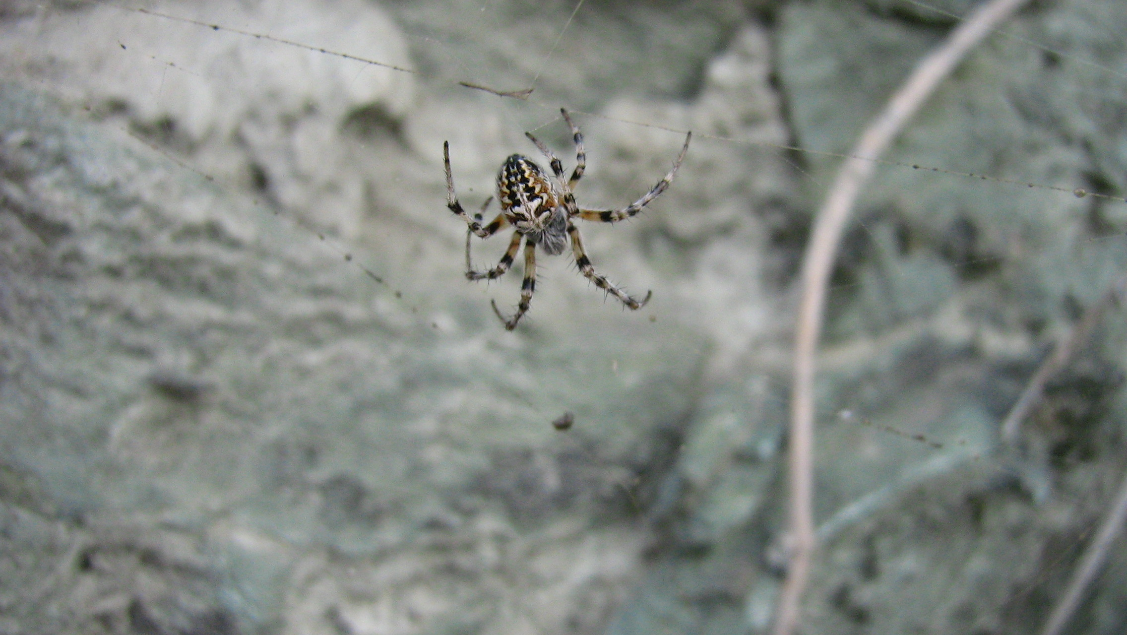 Spiders in rocks